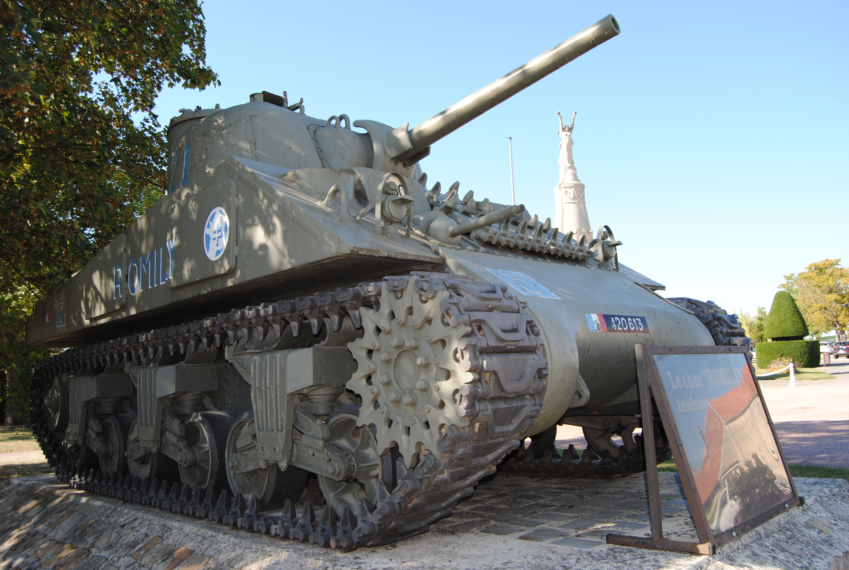 Premier char de la colonne Leclerc a être entré dans Paris en libérateur.